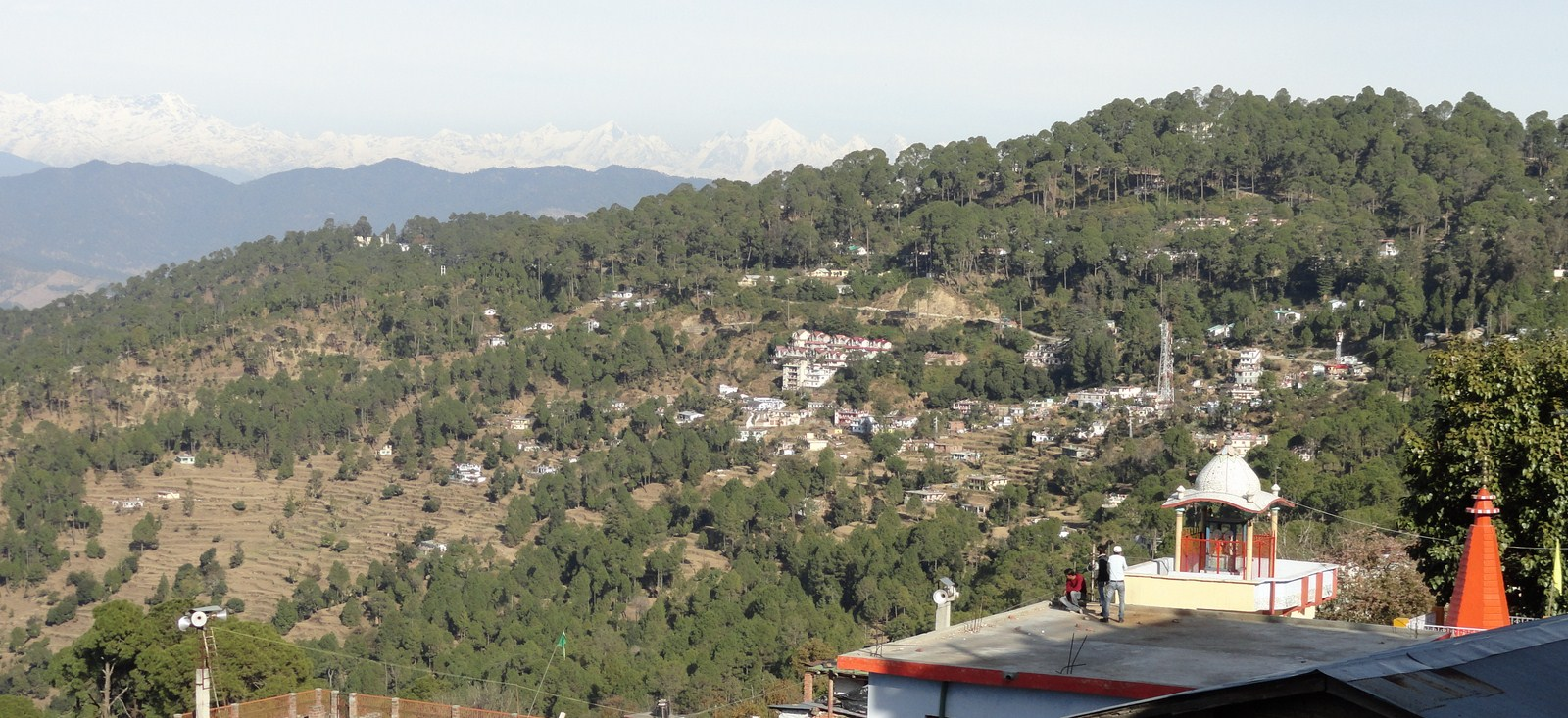 ranikhet